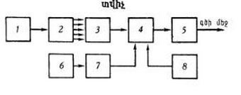 Հեռագրականապարատնկ2